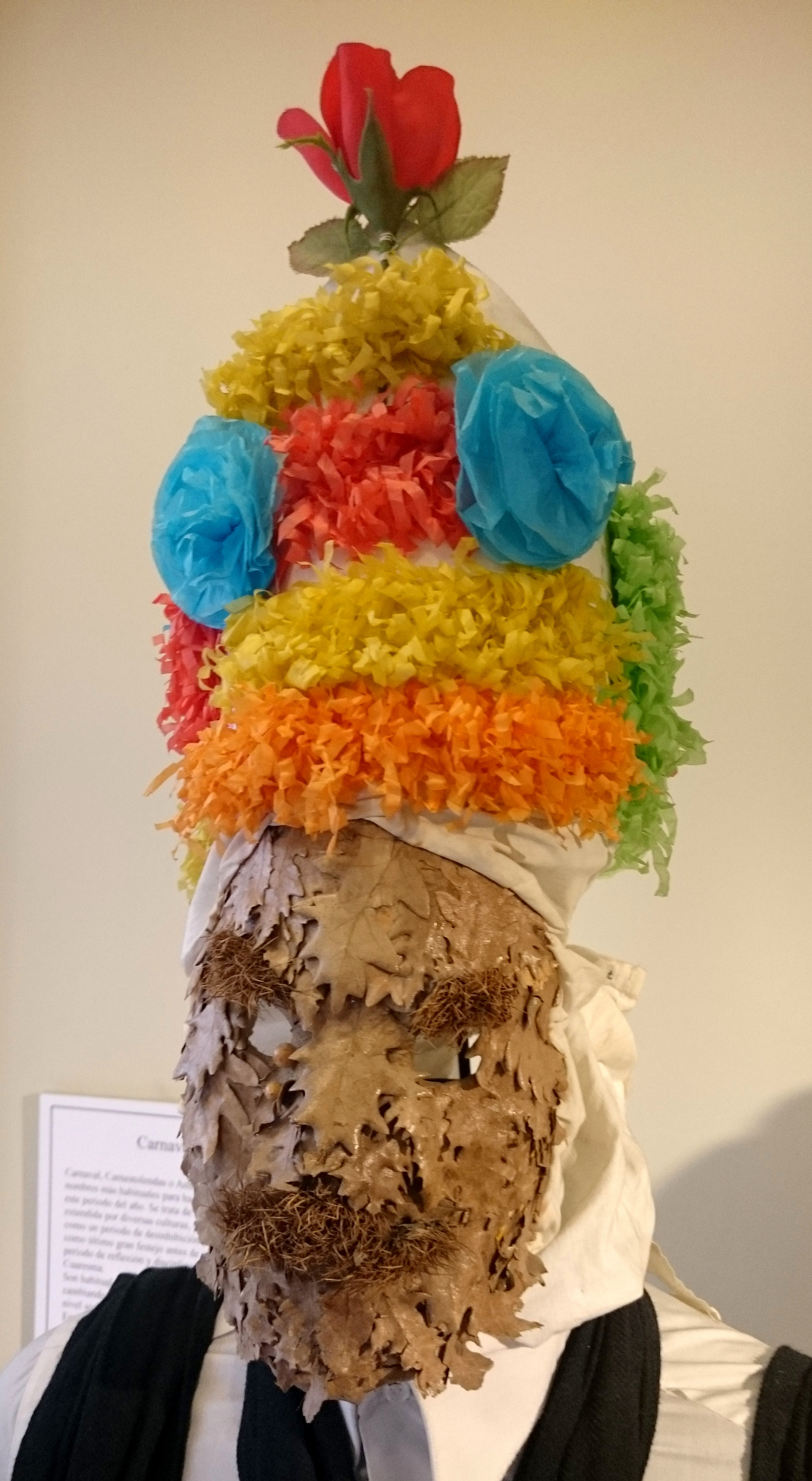 Máscara de botarga del carnaval de Almiruete (Guadalajara) en el Museo de Artes y Tradiciones Populares de Madrid